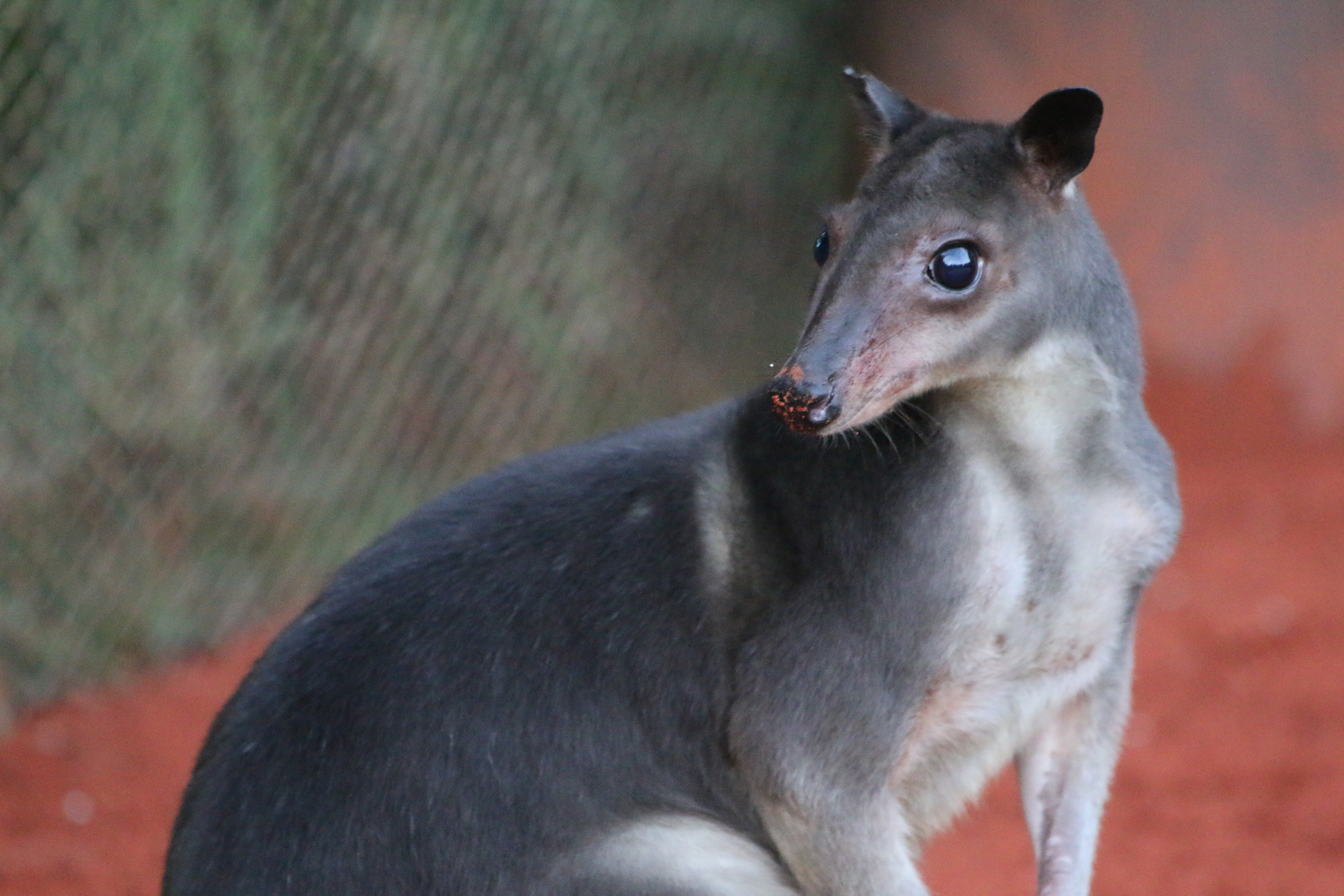 Dorcopsis à raies blanches à Pairi Daiza (Belgique)